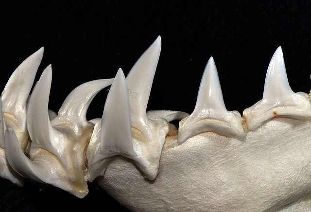 Isurus paucus